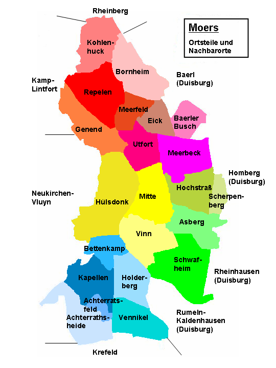 Umriss der Stadt Moers mit Ortsteilen und Nachbarorten